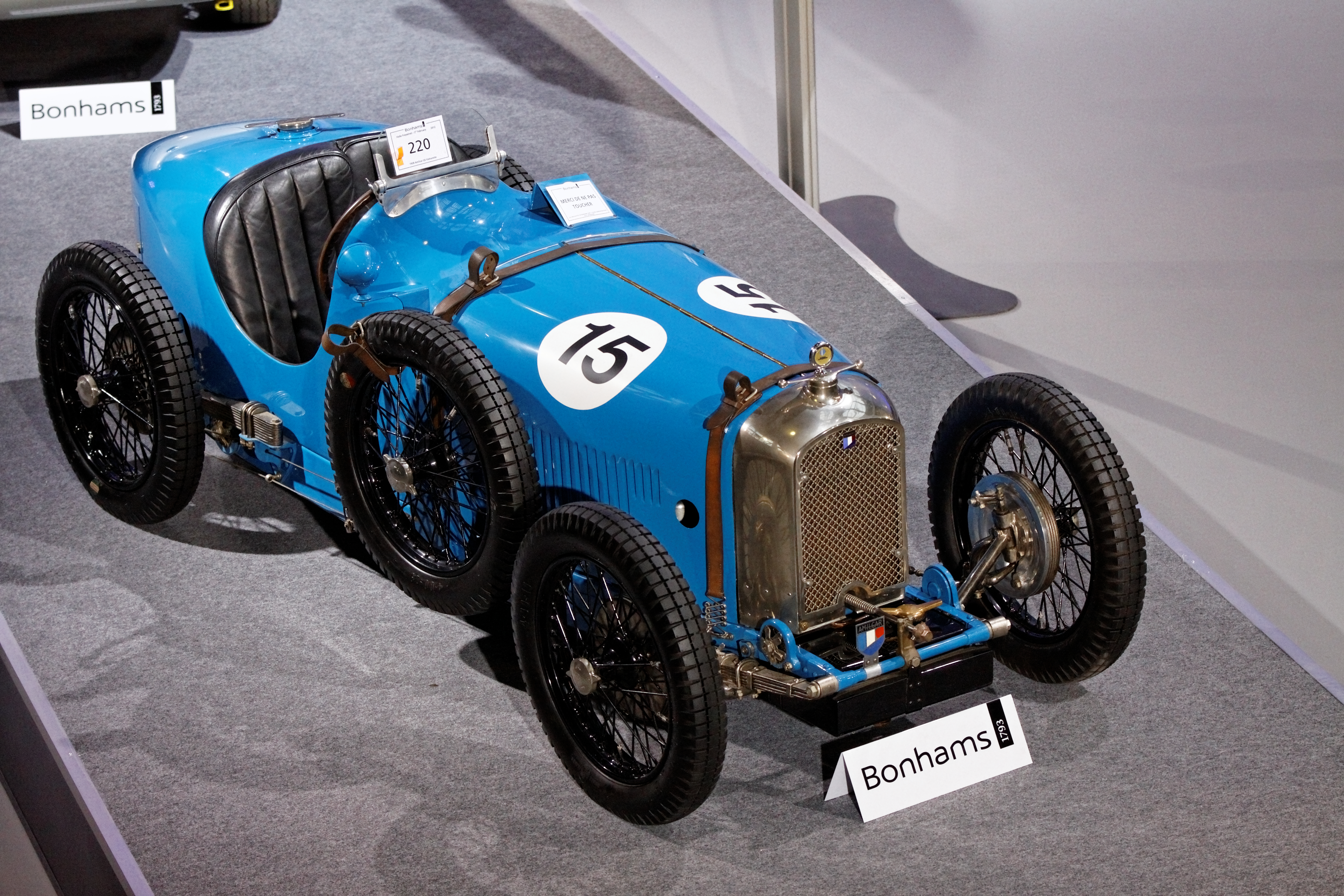 Amilcar C6 Voiturette